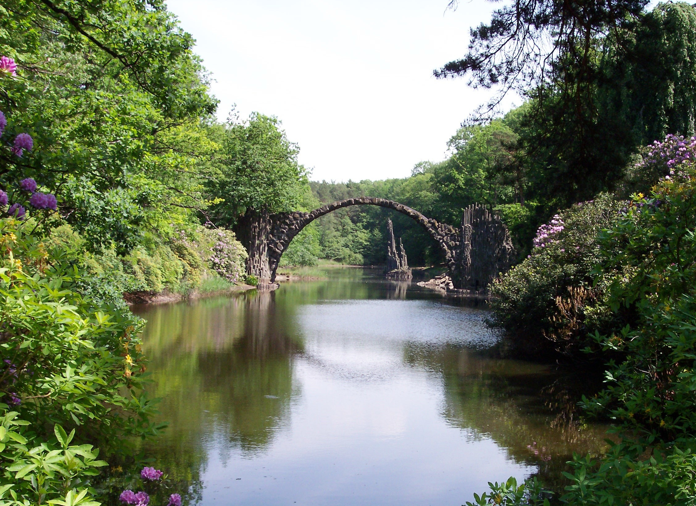 Rakotzbrücke im Azaleen- und Rhododendronpark Kromlau Map: 51° 32′ 11″ N, 14° 38′ 26″ E